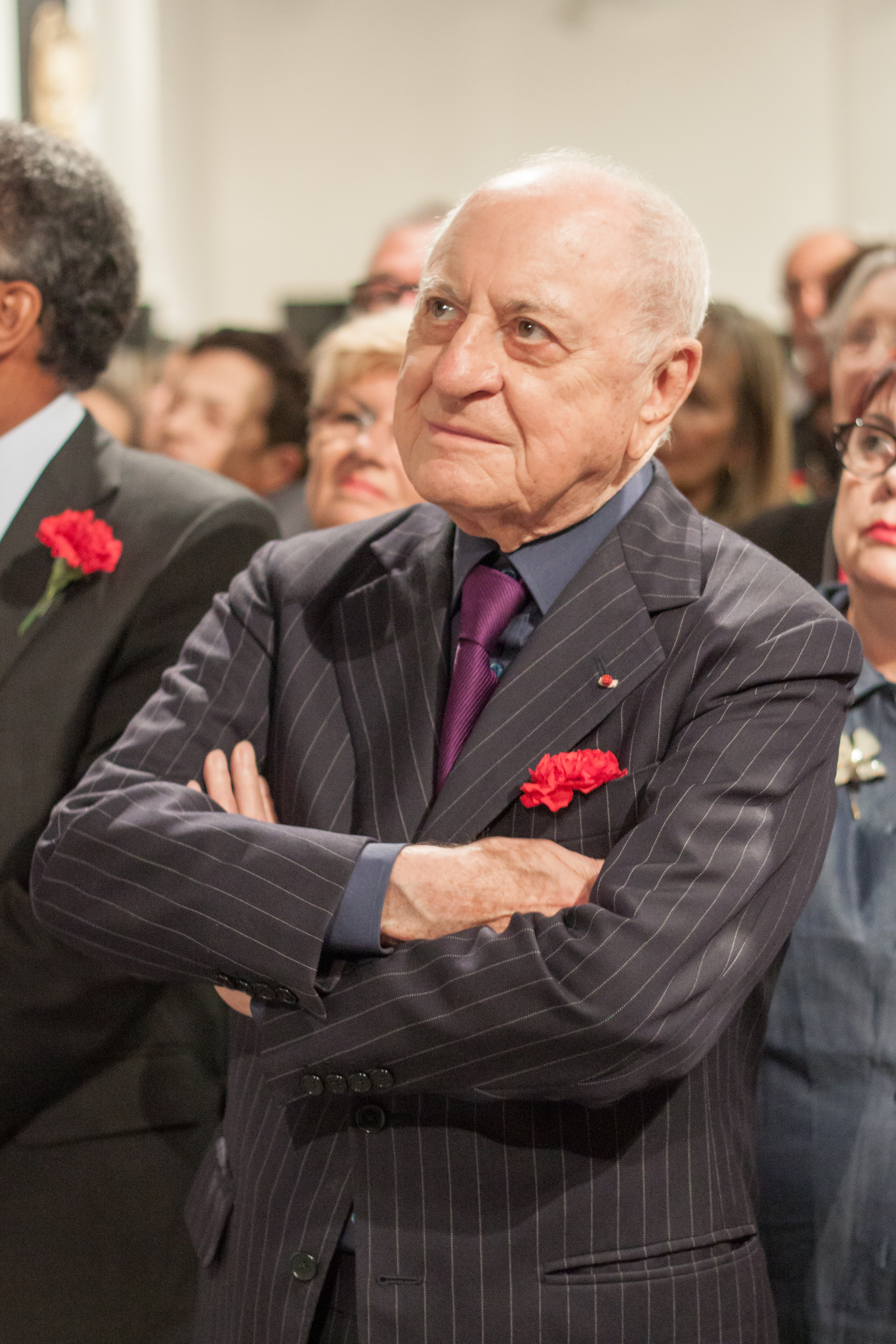 Pierre Bergé lors de son passage à Grenoble. Ici visitant l'exposition temporaire dédiée à Stendhal à la Bibliothèque d'étude et d'information de Grenoble.